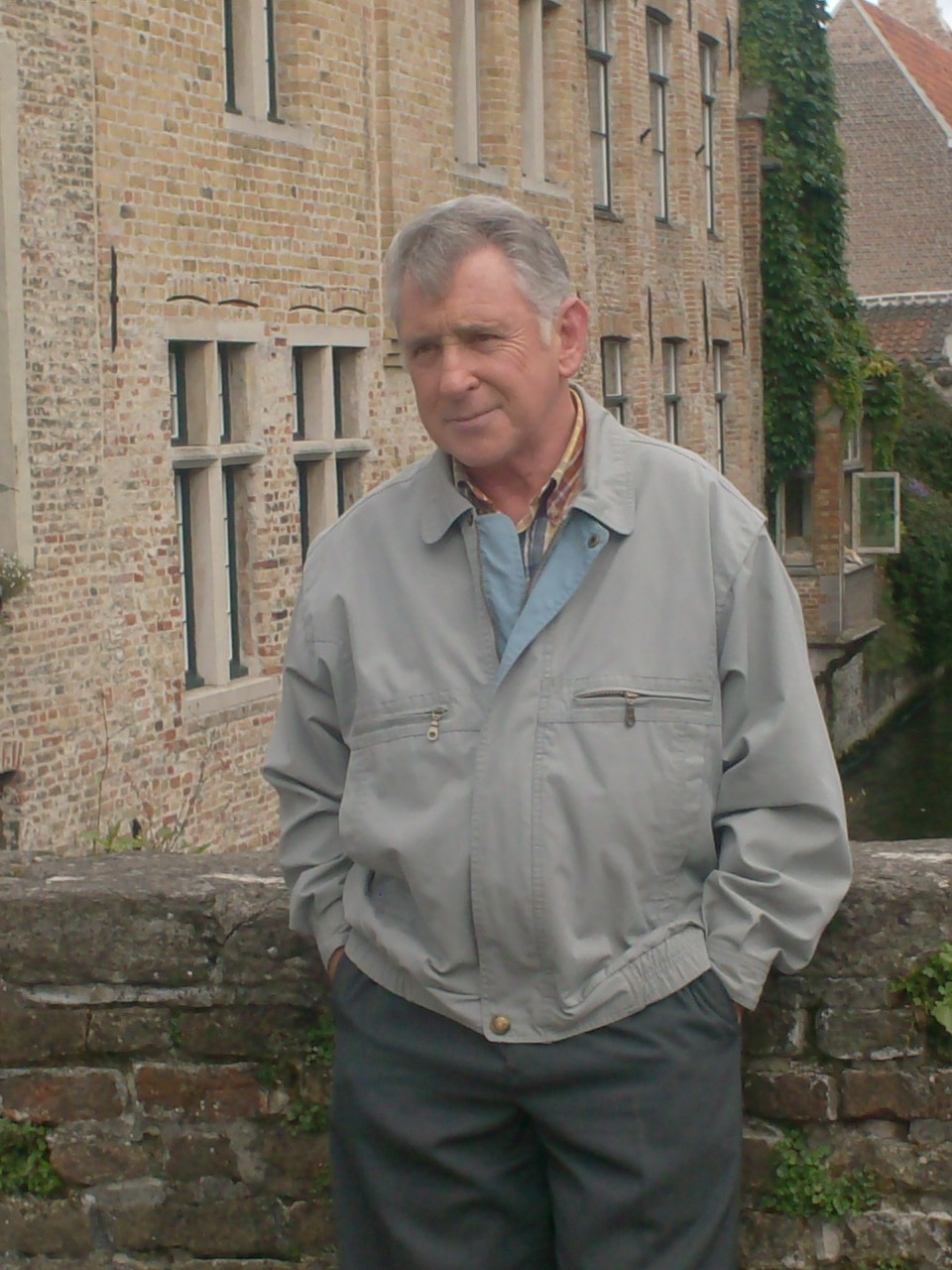 Foto van het "F.C. De Kampioenen"-personage Xavier Waterslaeghers - acteur Johny Voners